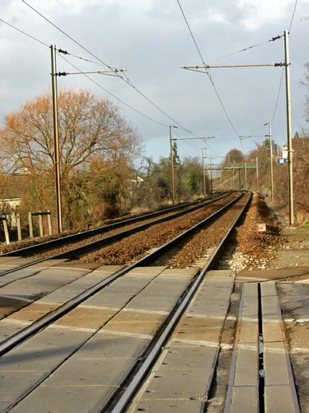 Voie ferrée électrifiée (double voie, caténaire 25 kV simplifiée, ligne Plaisir-Épône, Yvelines) Photo JH Mora ; janvier 2005 )